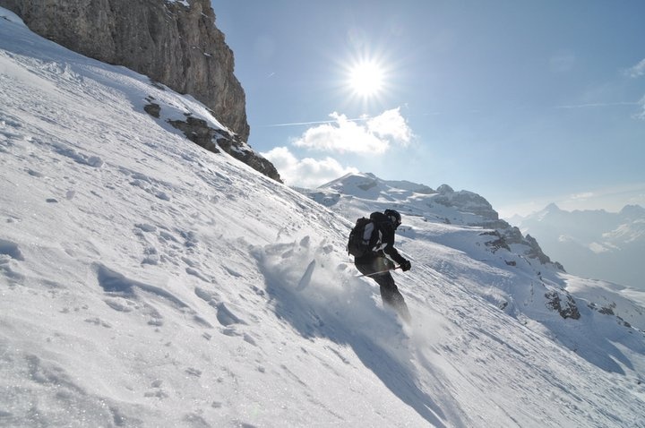 Alpin Skidåkning inför Lohajk 2012